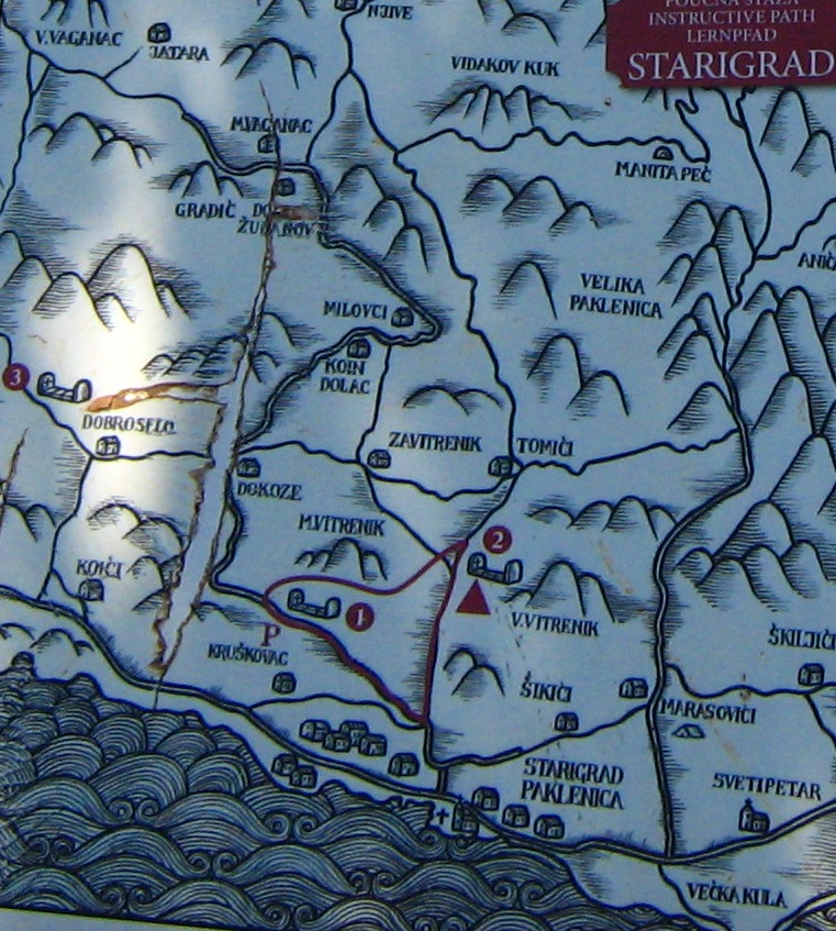 Mirila stone cemeteries in Dalmatia (Croatia), 17th to 20th century.